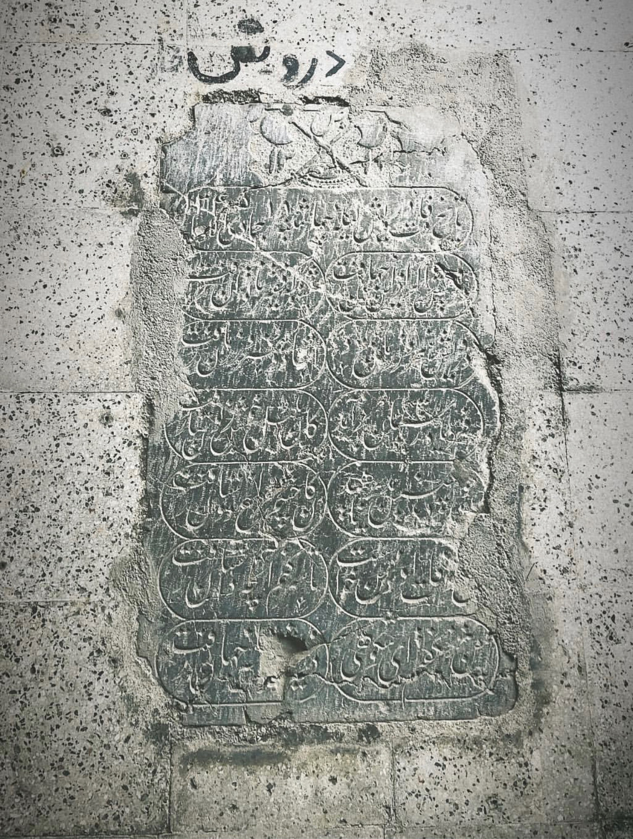 آرامگاه درویش خان